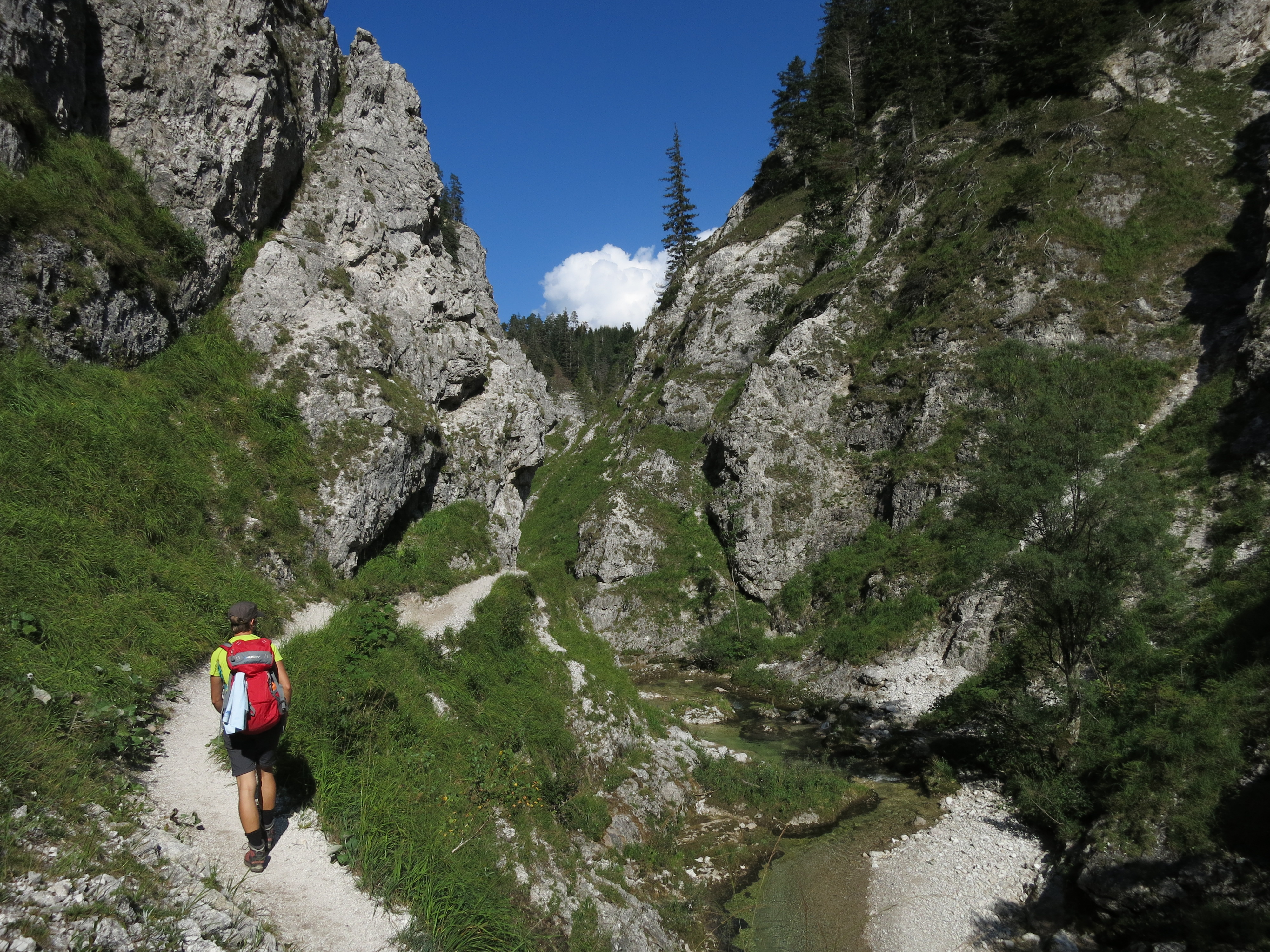 Ötscher-Tormäuer This file shows the Nature Park with the ID 3101 in Austria.